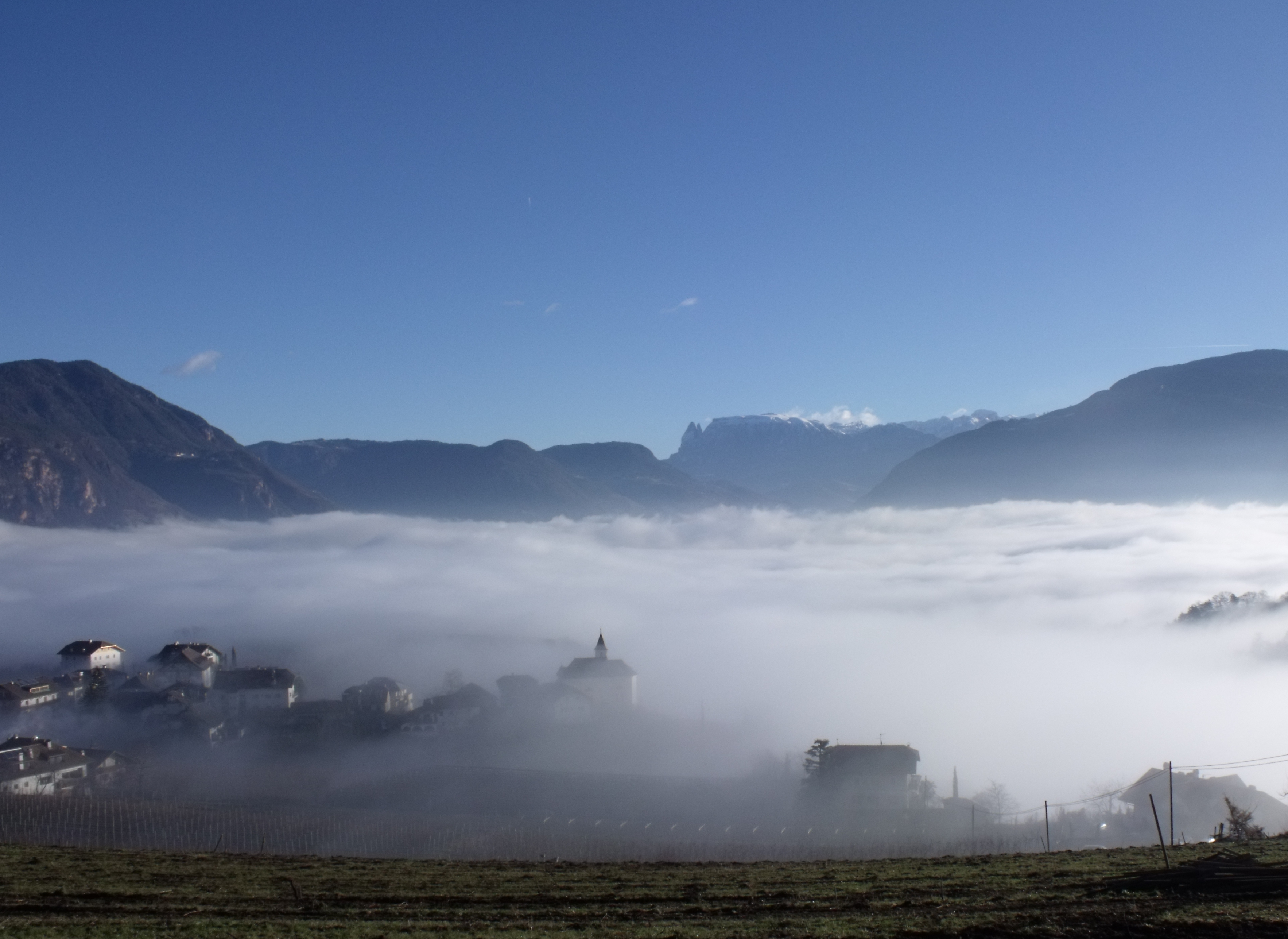 Missiano in mezzo alla nebbia. Sullo sfonfo il massiccio dello Sciliar